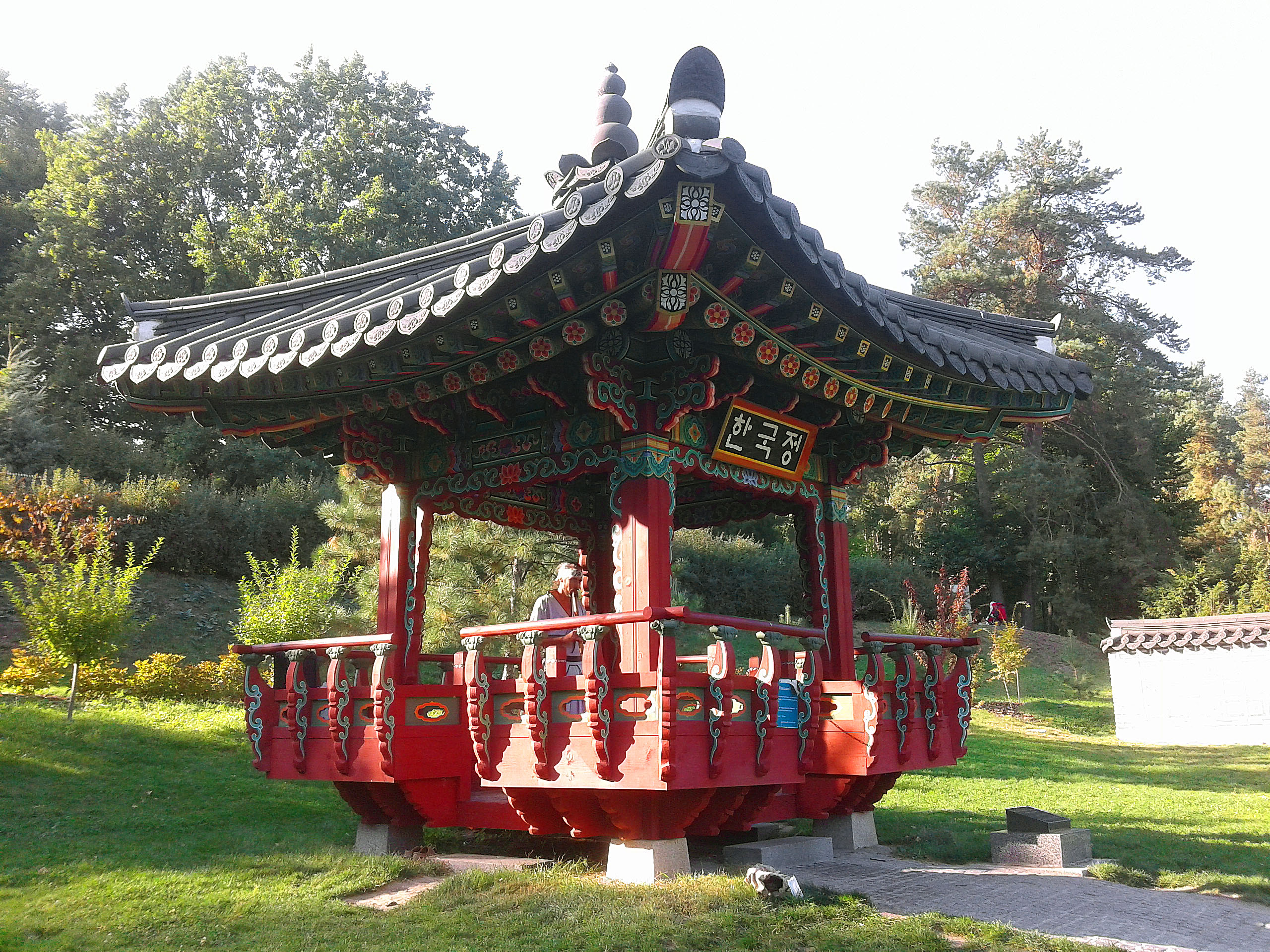 Корейський сад Чандук у Києві. Національний ботанічний сад імені Миколи Гришка НАН України